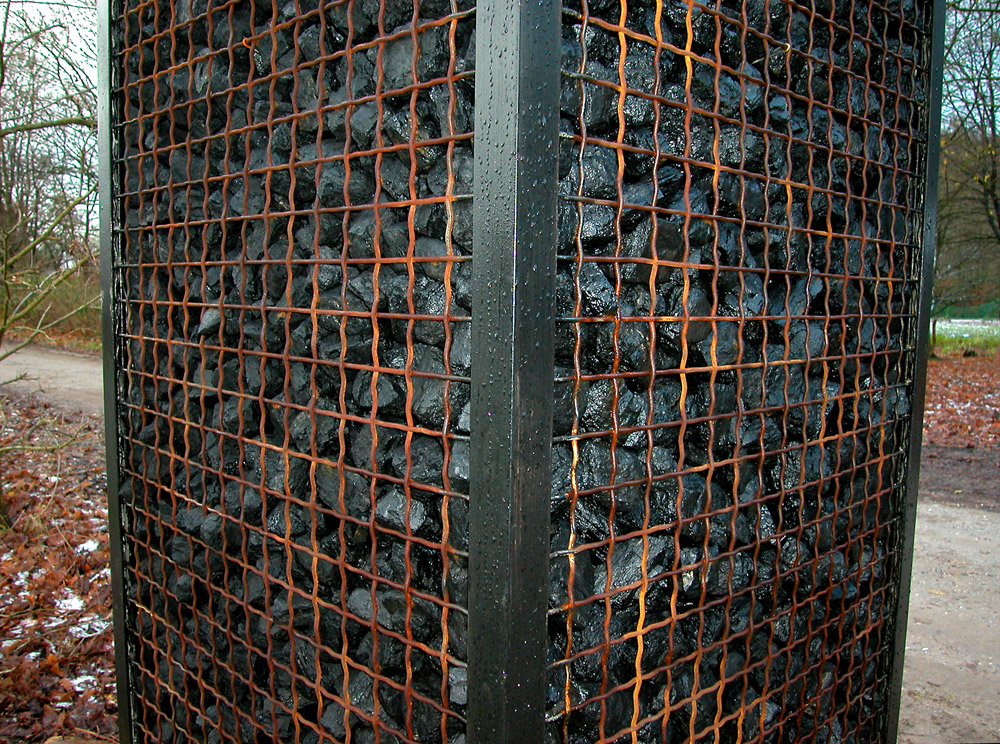 Kohl aus Hardt. Dorsten-Hardt. Nördliches Ende des Gahlener Kohlenwegs am Standort des ehemaligen Kohlhaus Gahlen